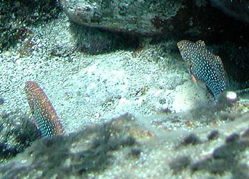 Macropharyngodon geoffroyi Syn. Macropharyngodon geoffroy